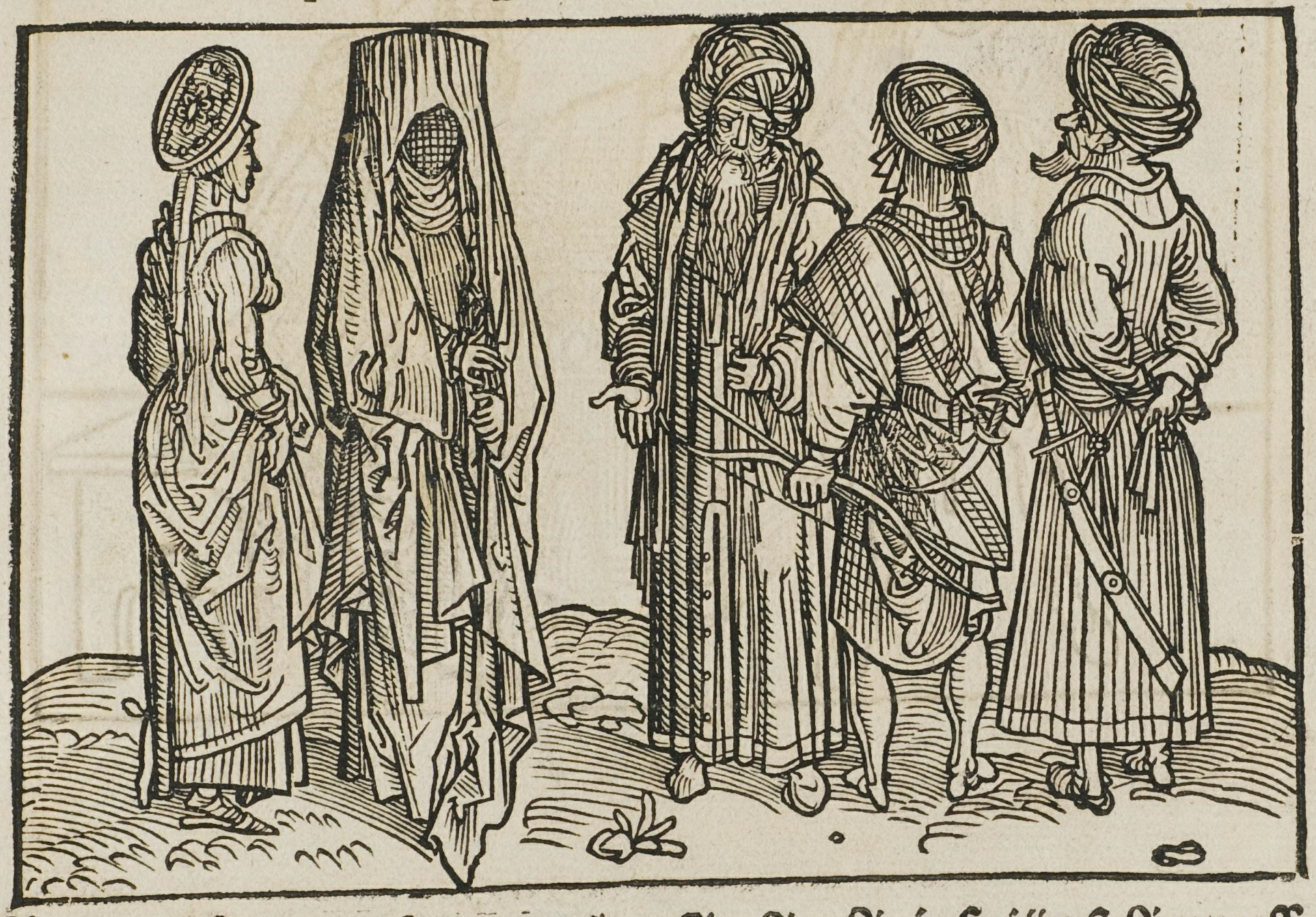 Sarazenen